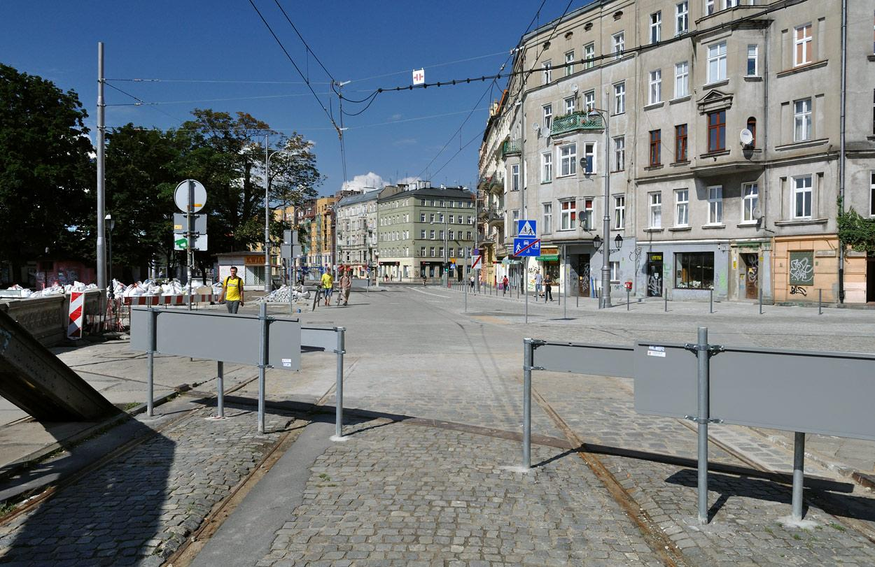 Była linia tramwajowa a jest chodniczek. Izolator sekcyjny trafił w sam środek tego chodniczka ;)